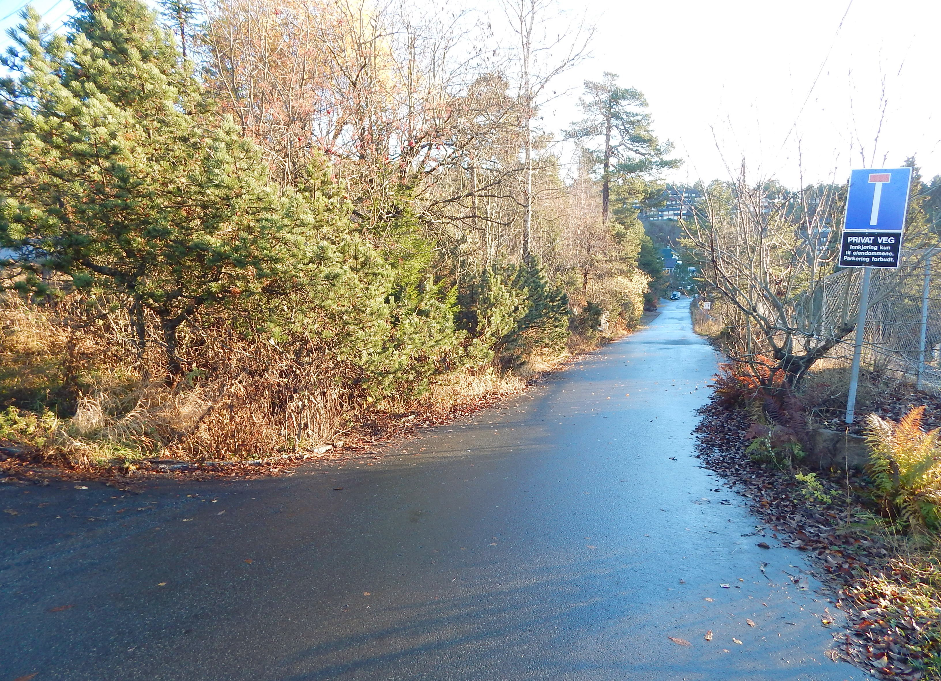 Voksenliveien, enden mot Hospitsveien